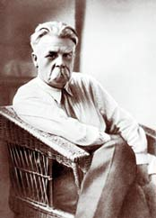 Никола́й Константи́нович Кольцо́в (1872—1940) — выдающийся русский биолог, автор идеи матричного синтеза.